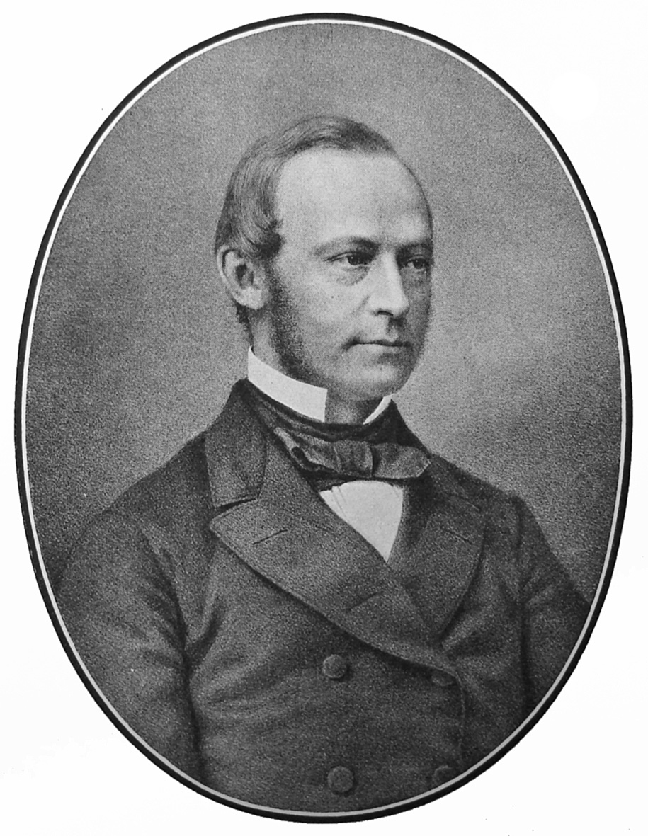 Carl Frederik Tietgen eller C.F. Tiegen, født 19. marts 1829 og død 19. oktober 1901, var dansk industrimand og opnåede titel af gehejmekonferensråd.